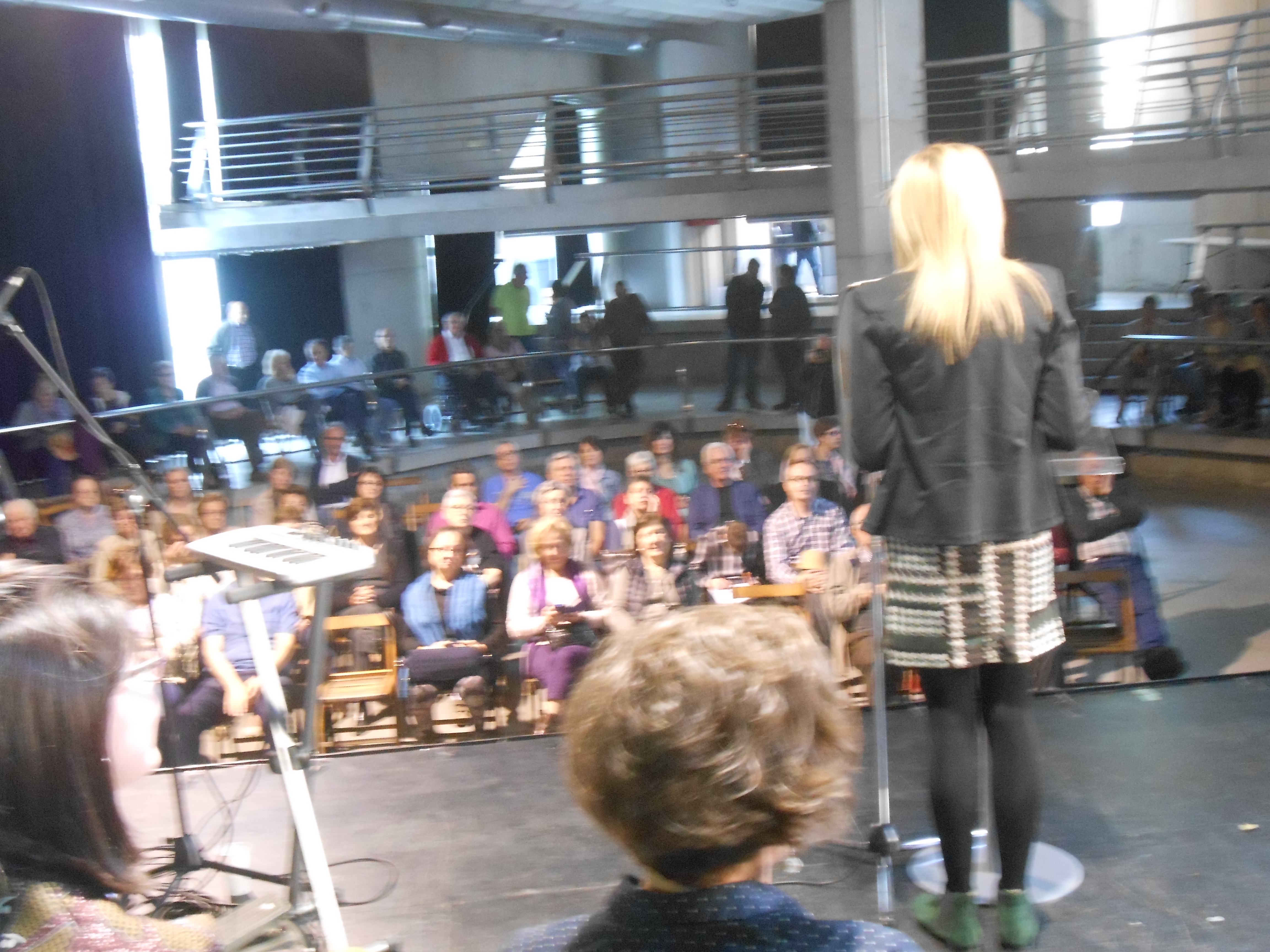 lecturadetpr,almoster